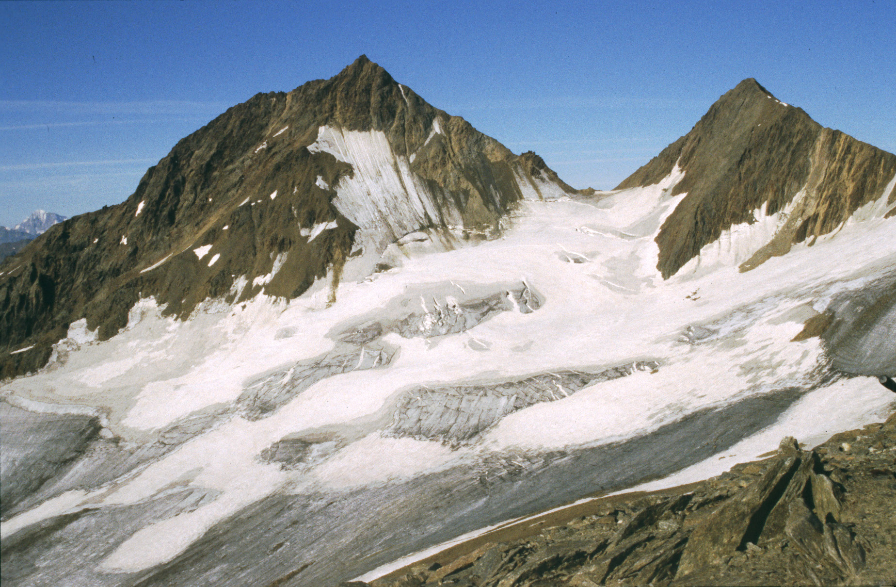 Schwemser Spitze (links) von Nordosten, rechts die Äußere Quellspitze